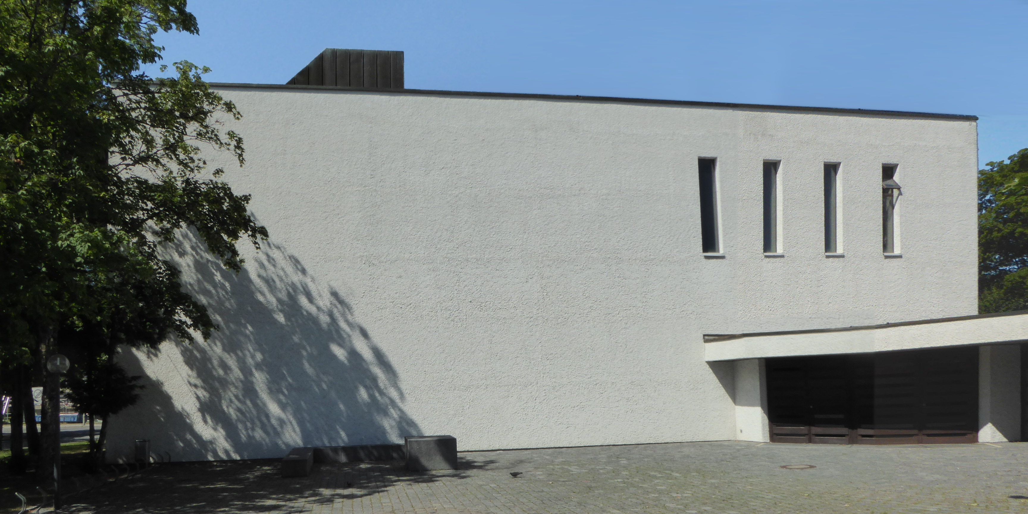 Boarisch: De Matthäuskiach im Hosnbeagl z'München (Mingga), vo Sidn xeng.